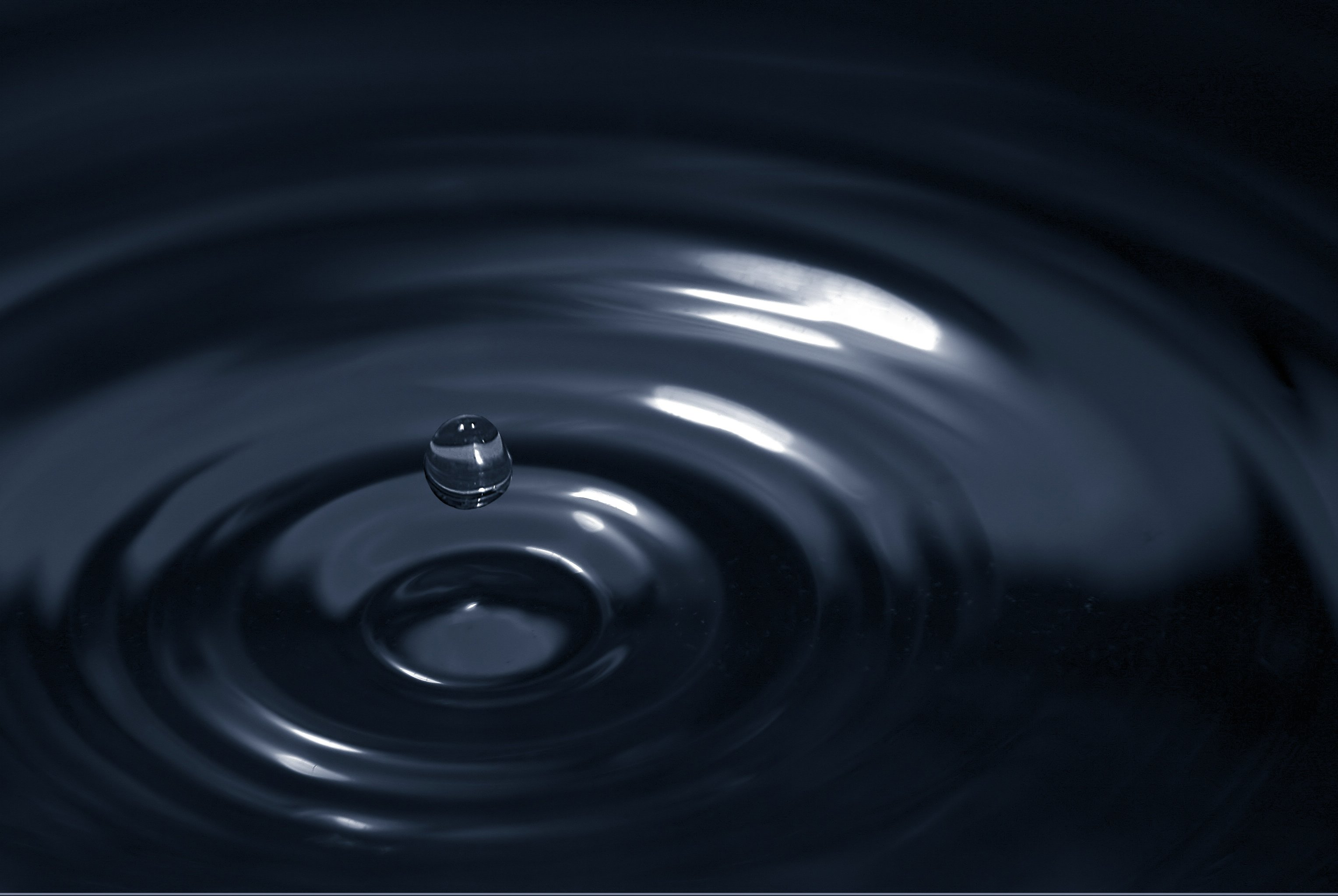 A water drop